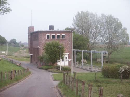 Kalflack-Schöpfwerk, Oraniendeich 440, Kleve-Warbeyen